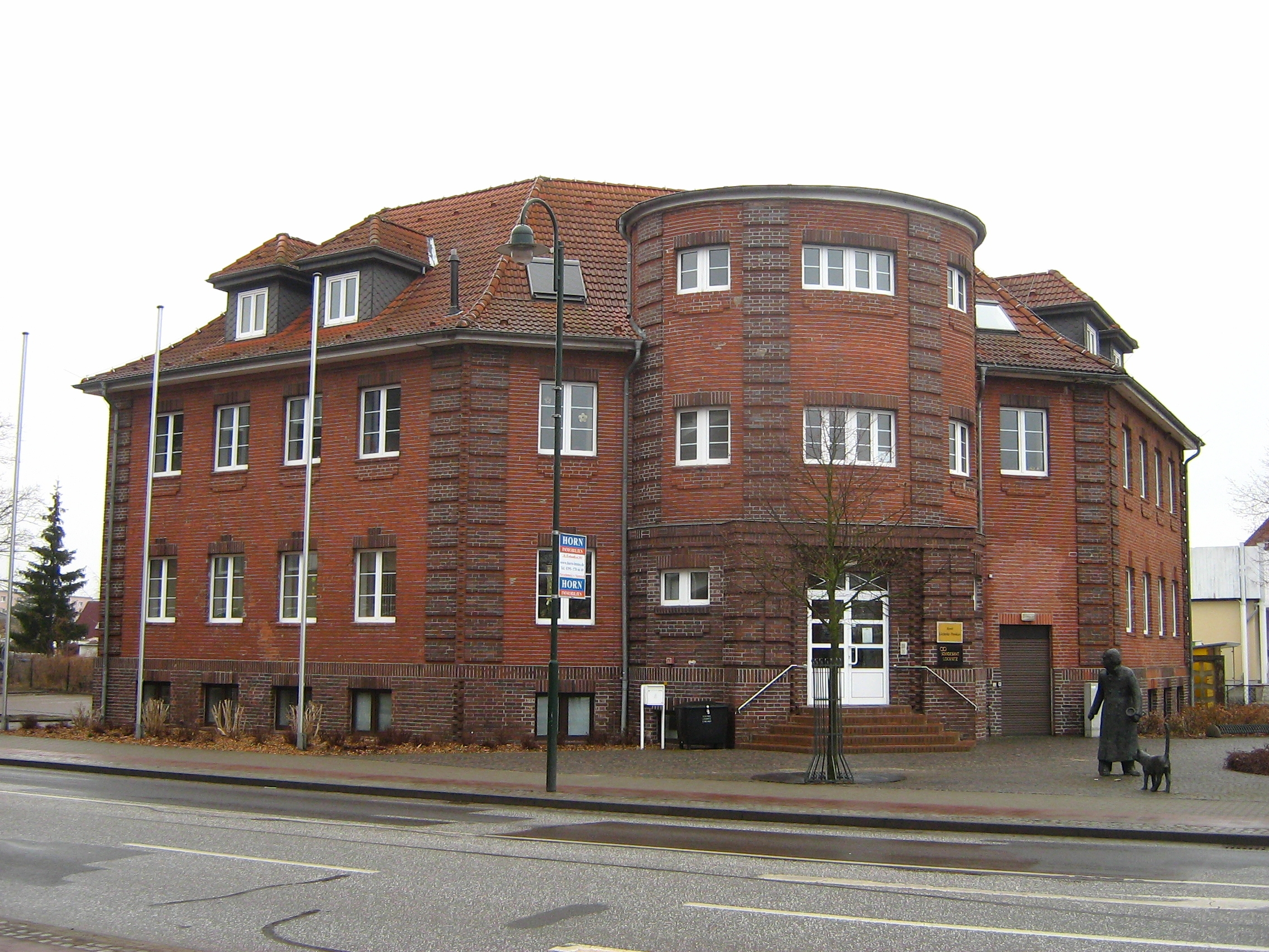 Gebäude der Gemeindeverwaltung in Löcknitz (Vorpommern).